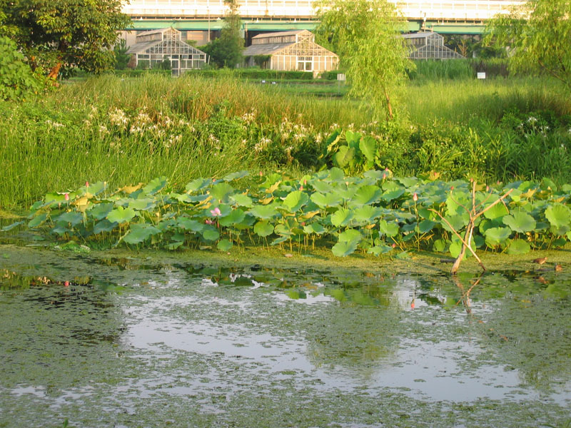 中文（台灣）: 國立臺灣大學水源池，上方溫室為臺大農場的設備。